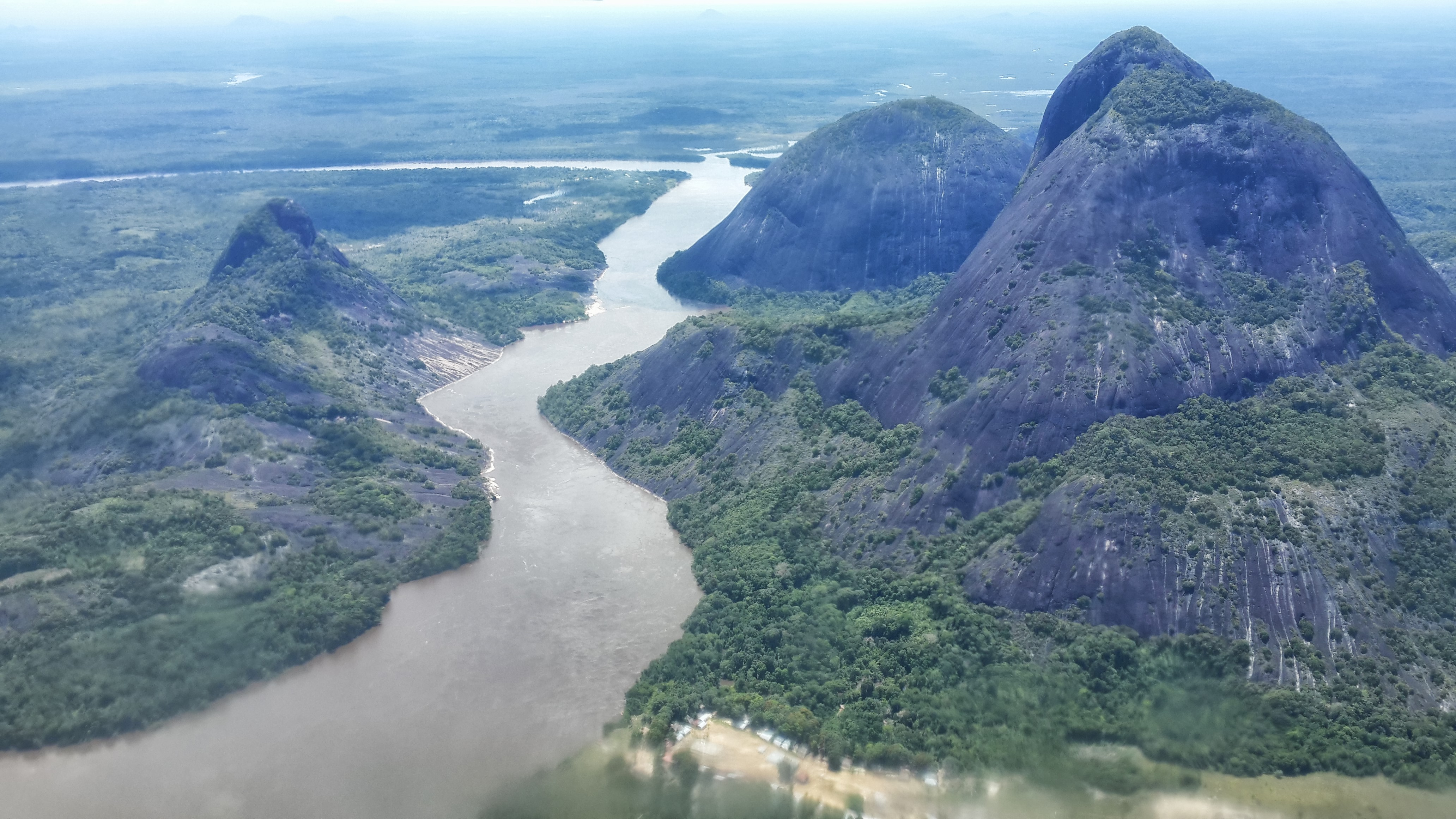 Cerros de Mavecure, Inirida